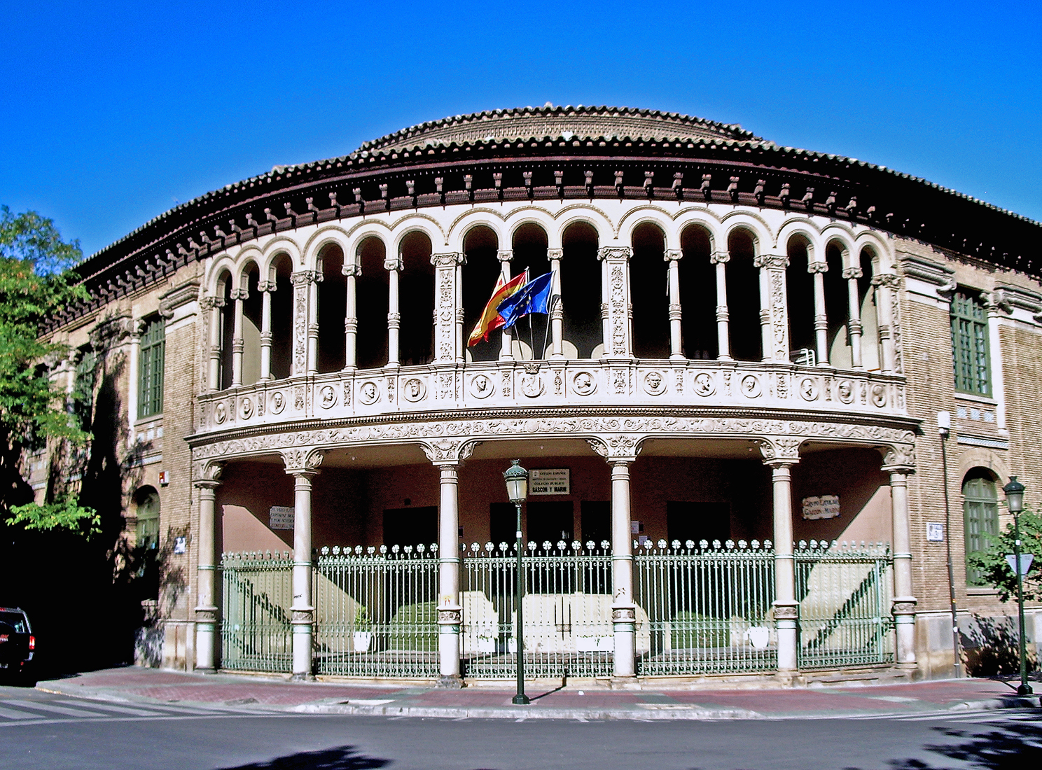 Grupo escola Gascón y Marín (Zaragoza, España)